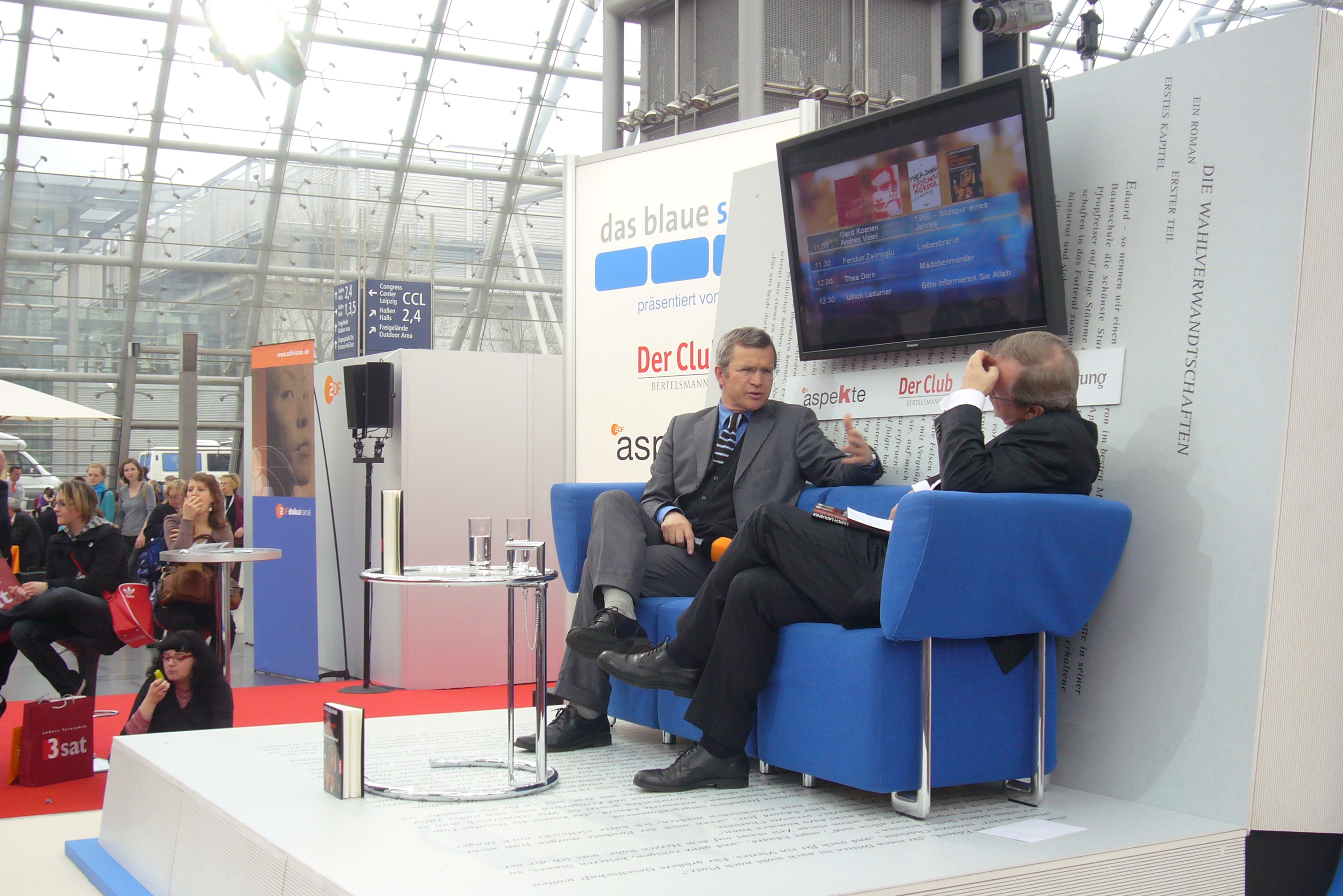 Dieses Fotos dürfen Sie honorarfrei nutzen, wenn Sie folgenden credit beachten: Copyright: Das blaue Sofa / Club Bertelsmann. Ulrich Ladurner, geboren 1962 in Meran/Südtirol, studierte Politikwissenschaft und Geschichte in Innsbruck. Seit 1999 berichtet er als Auslandsredakteur der Wochenzeitung DIE ZEIT aus Irak und Iran, Afghanistan und Pakistan. Er lebt in Hamburg. Bücher: „Bauern am Berg“ (1996), „Islamabadblues“ (2001), „Tausendundein Krieg“ (2004), „Die Asadis“ (2006), „Südtirol liegt am Meer“ (2006), „Die iranische Bombe“ (mit Gero von Randow, 2006), „Bitte informieren Sie Allah!“ (2007), "Solferino" (2009)